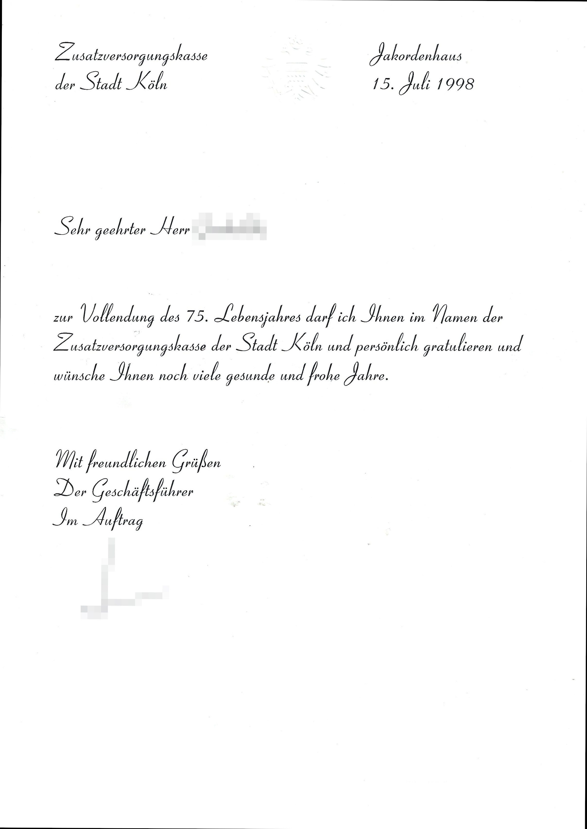 Geburtstagsglückwunschschreiben Zusatzversorgungskasse der Stadt Köln zum 75. Geburtstag - 1998